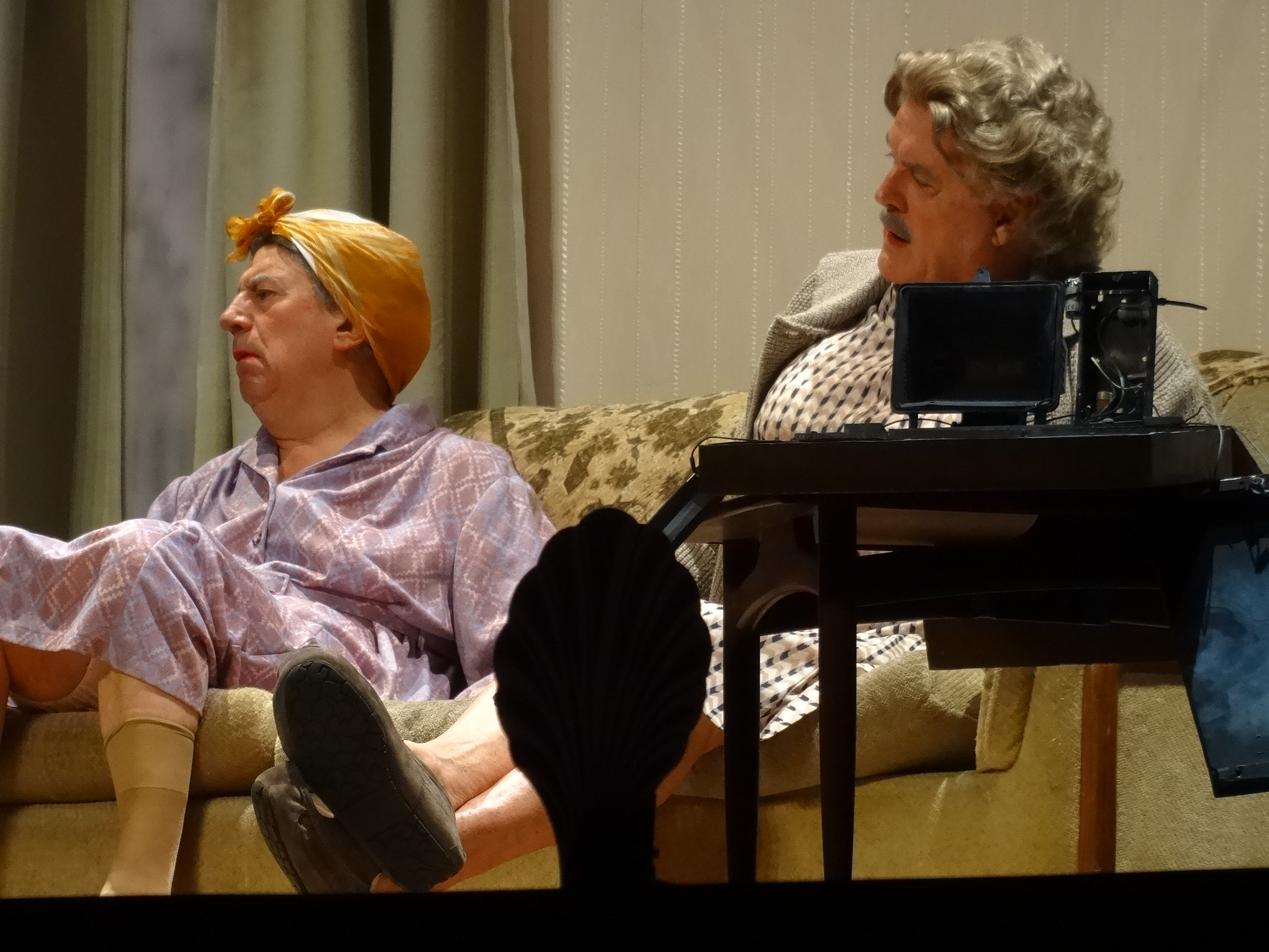 Photo 02-07-14 12 24 16